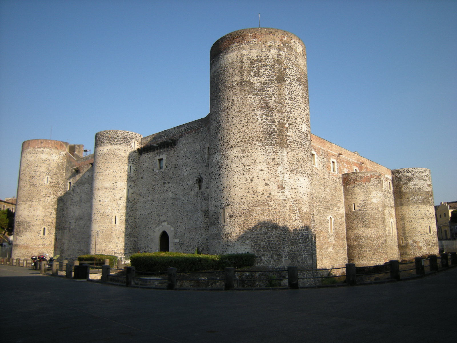 Castelo medieval de Catania.